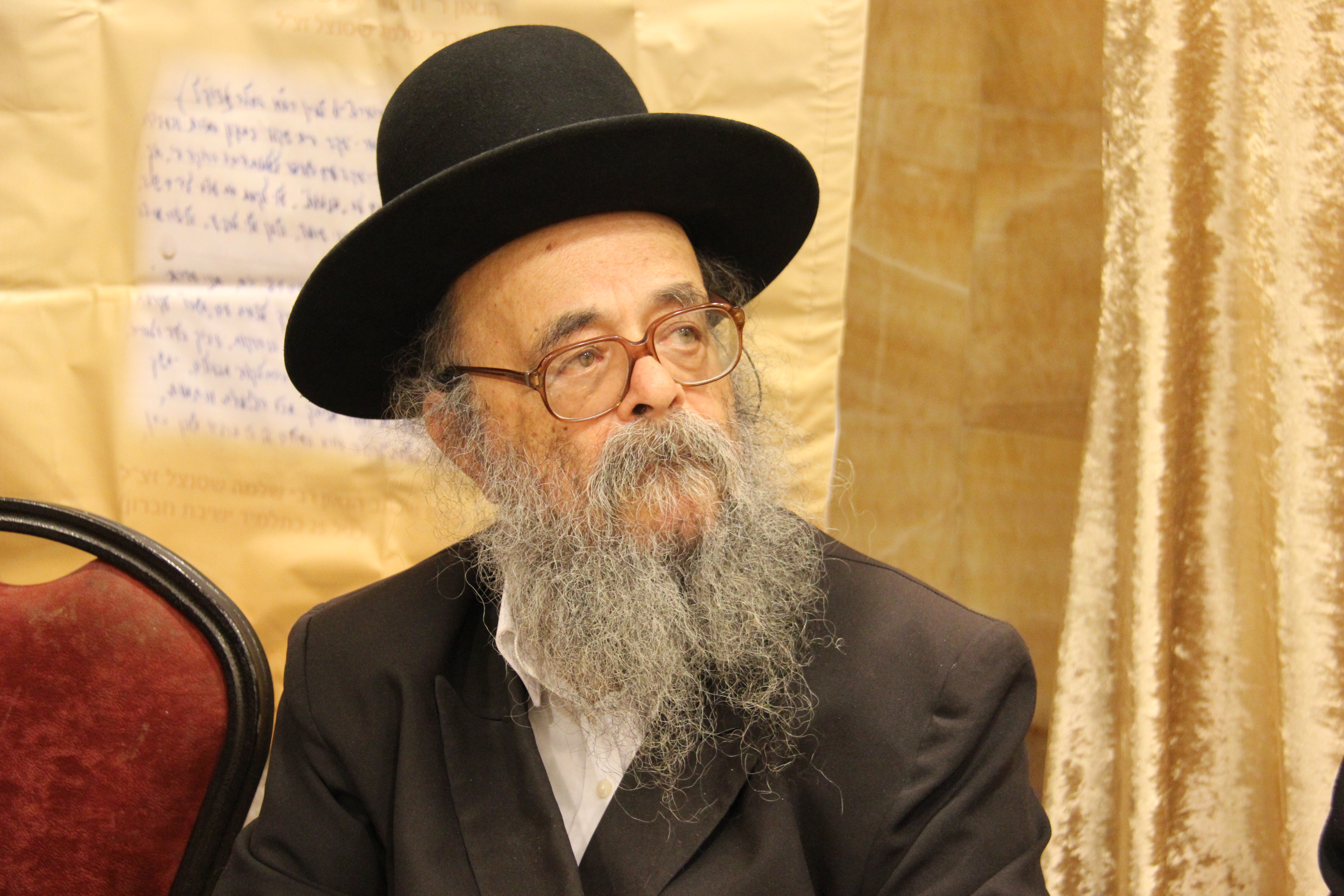 הכנסת ספר תורה ביתר עילית הגאון רבי דוד הירשמן עם הרב יונתן שטנצל עורכים סיום משותף על מסכת תענית